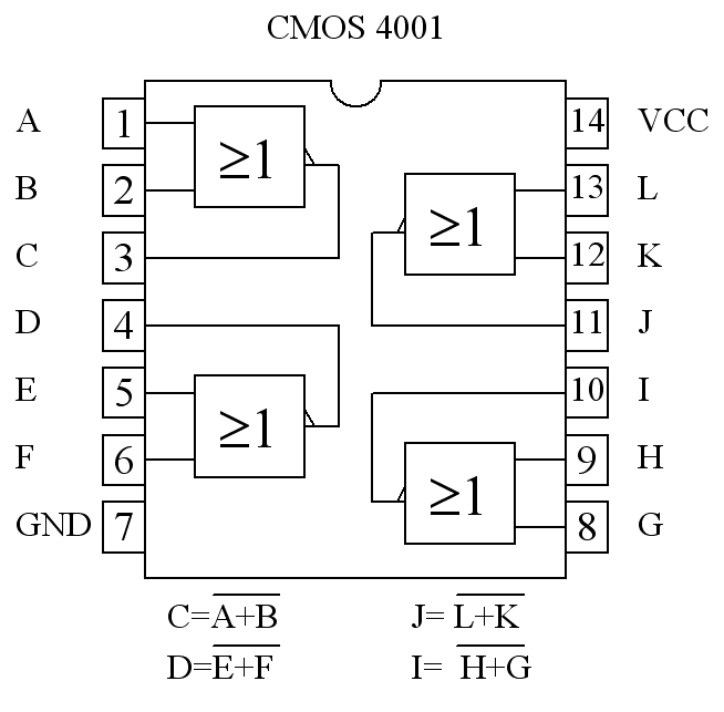 Brochage du composant CMOS4001